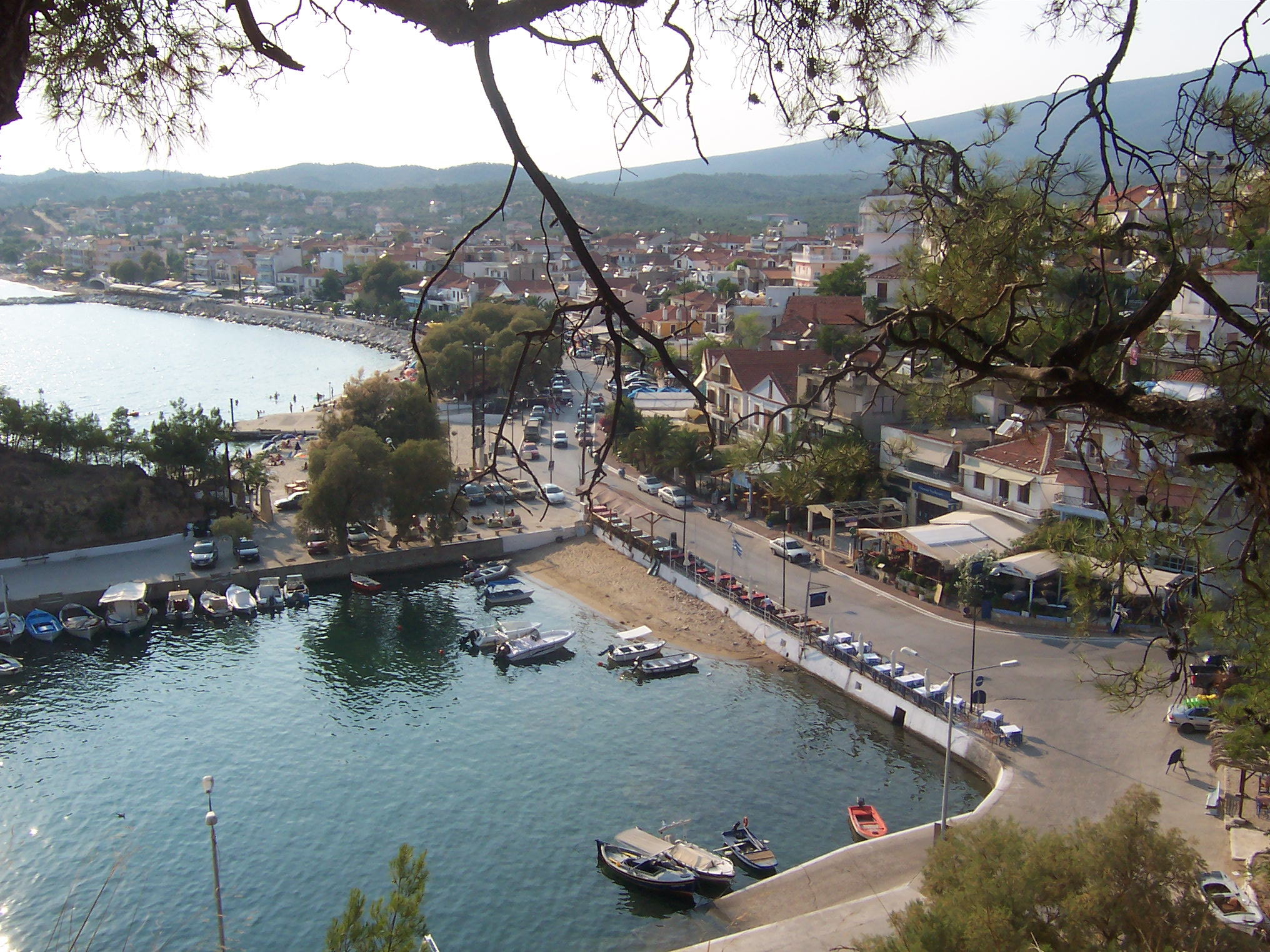 Znany region z wydobywania złóż metali w Limenaria